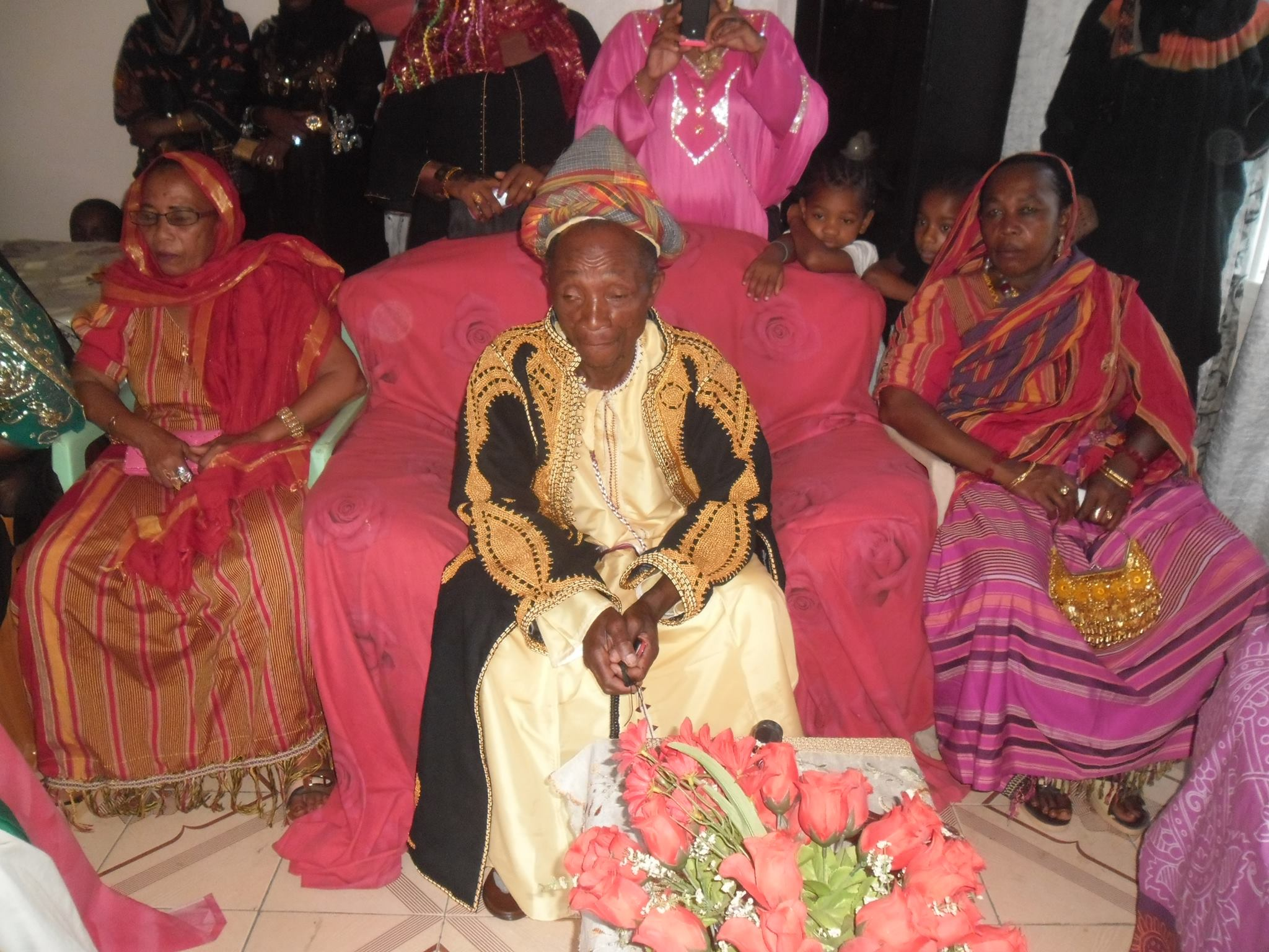 Les habits portés par les maris le jour du grand mariage comorien